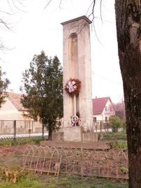 Első világháborús emlékmű, Felsőnyék